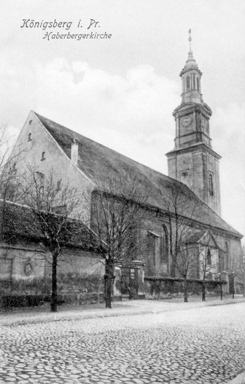 Habernberger Trinitas Kirche